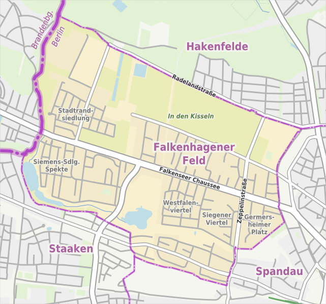 Übersichtskarte der Straßen und Ortslagen in Berlin-Falkenhagener Feld